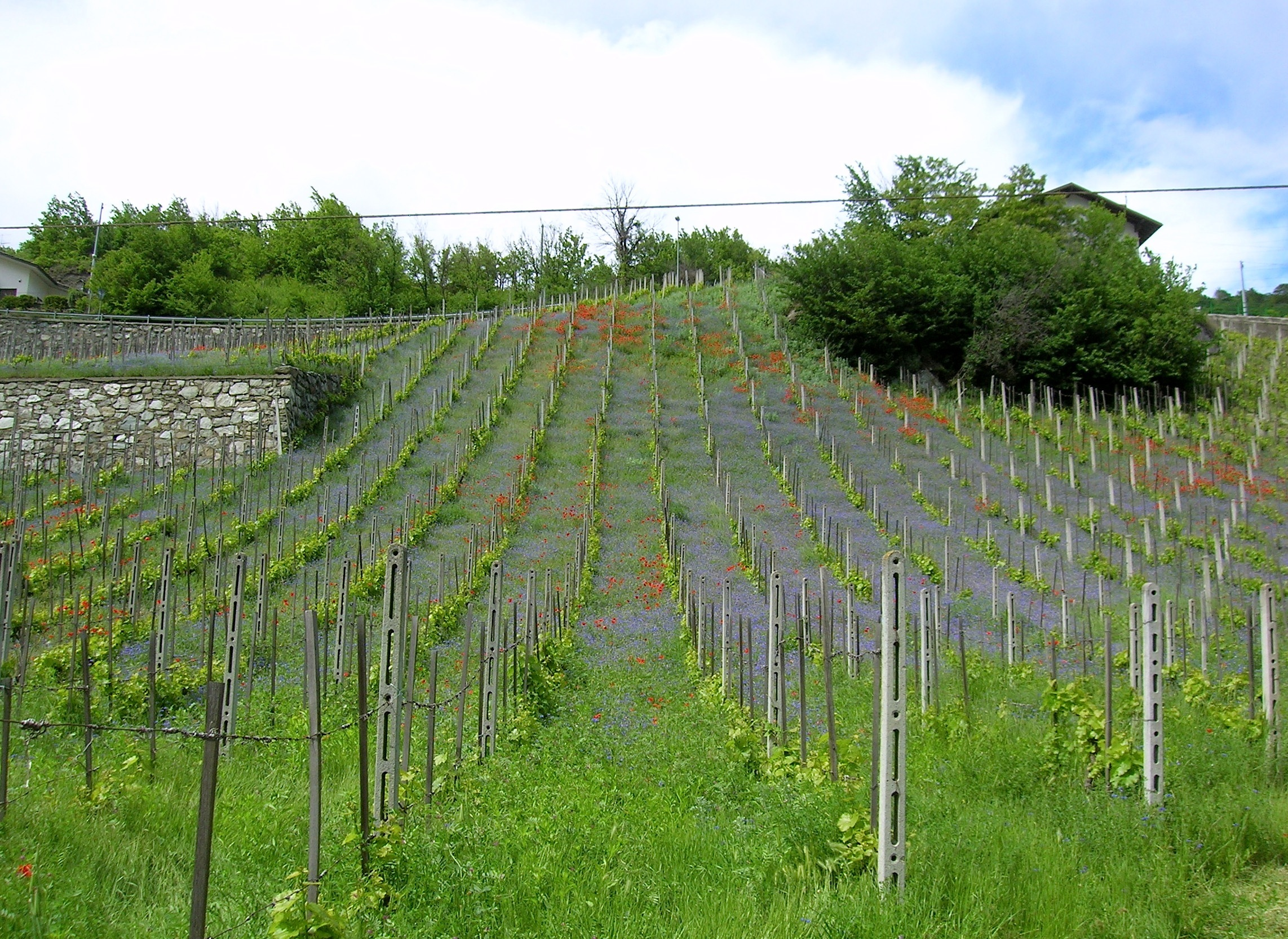 vigna del Valle d'Aosta Chambave Moscato